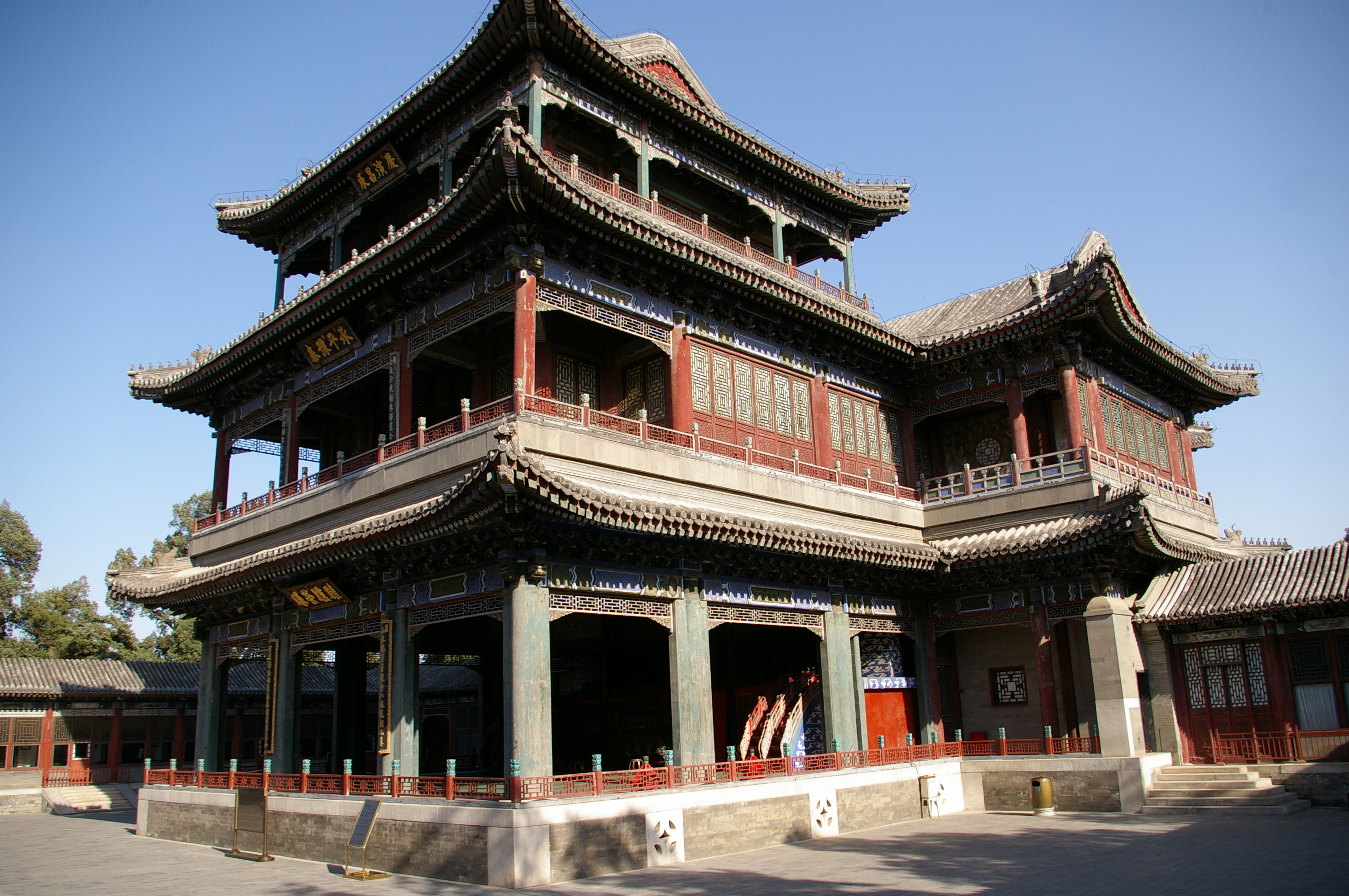 Pałac Letni w Pekinie